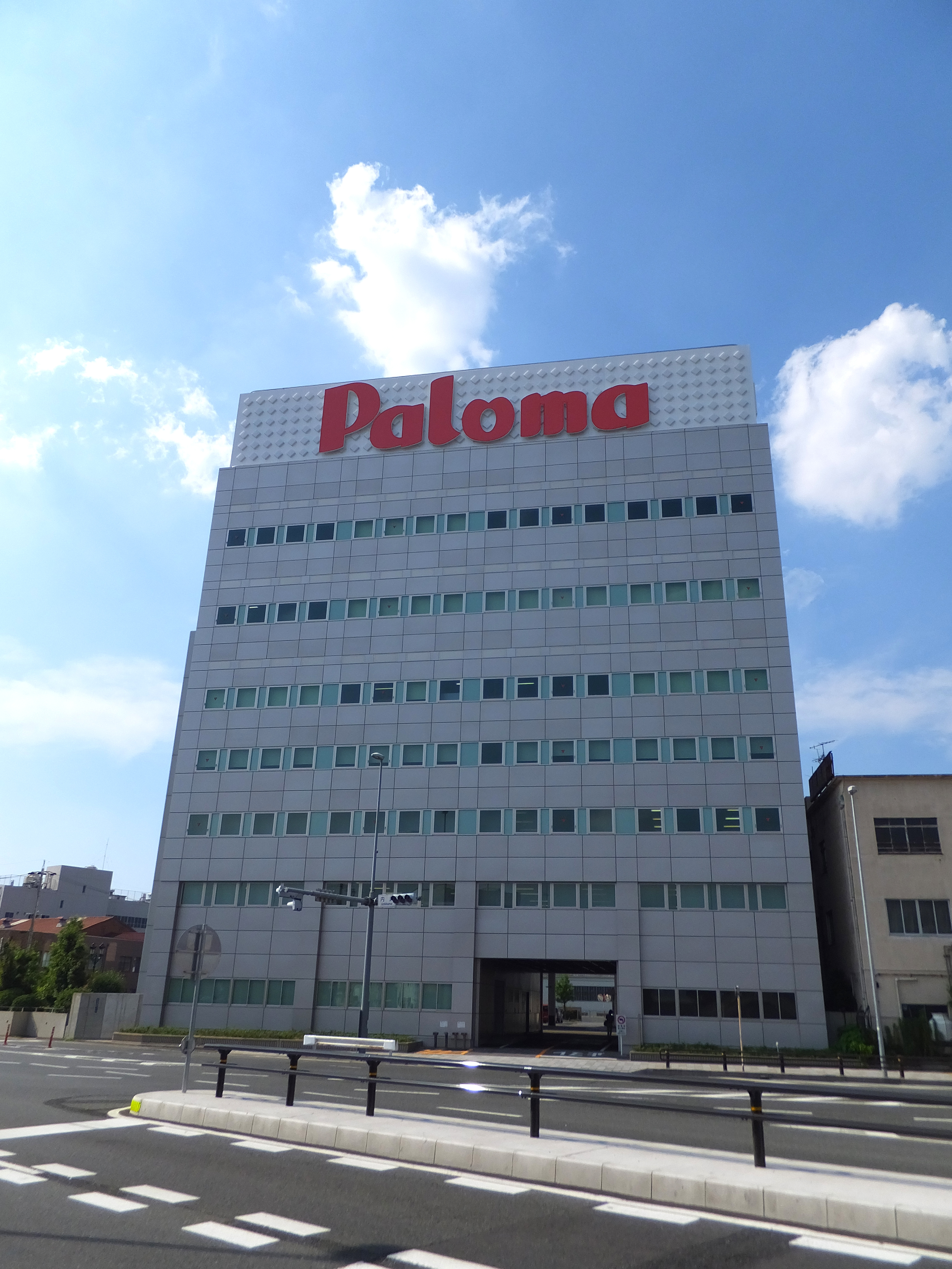 名古屋市瑞穂区桃園町 パロマ本社画像